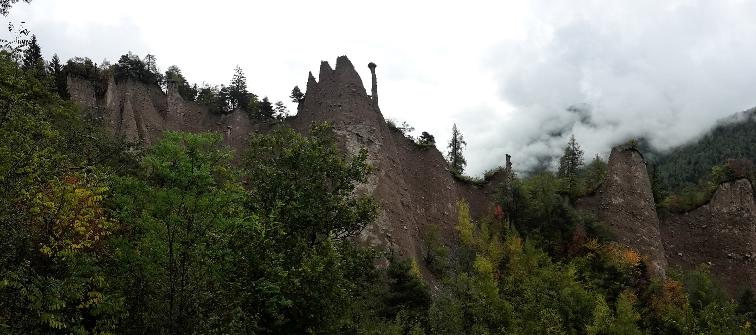 Piramidi di Segonzano d'autunno